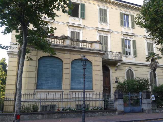 Institut International des études Ligures